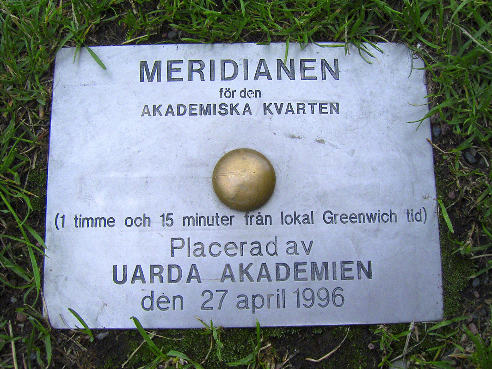 Diese Plakette ist vor dem Springbrunnen im Park der Universität der südschwedischen Stadt Lund (Lundagård) eingelassen. Sie markiert scherzhaft den Meridian für die Bestimmung des „Akademischen Viertels“. Die dafür verantwortliche „Uarda-Akademie“ ist ein 1958 in Lund gegründeter Studentenverein, der sich der Tradition studentischen Satire- und Musiktheaters verschrieben hat, die bis auf das Jahr 1908 zurückgeht.